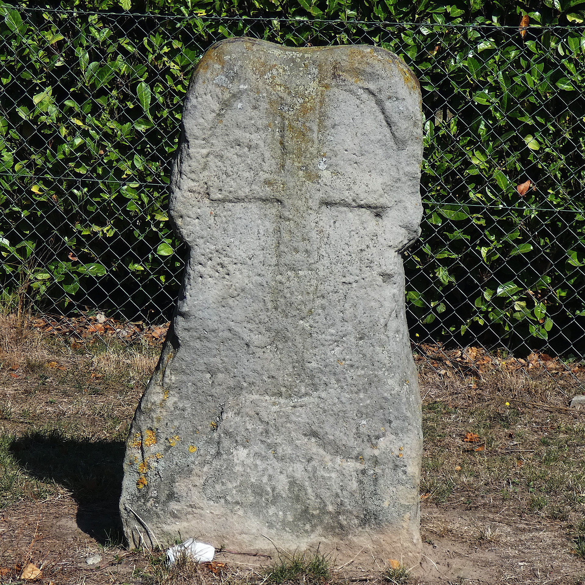 Der Siebstein oder Siebmacherstein ist ein Kreuzstein in Harkenbleck, einem Stadtteil von Hemmingen in der Region Hannover in Niedersachsen. Der einst über die Gemeinde hinaus bekannte Siebstein steht unter Denkmalschutz.